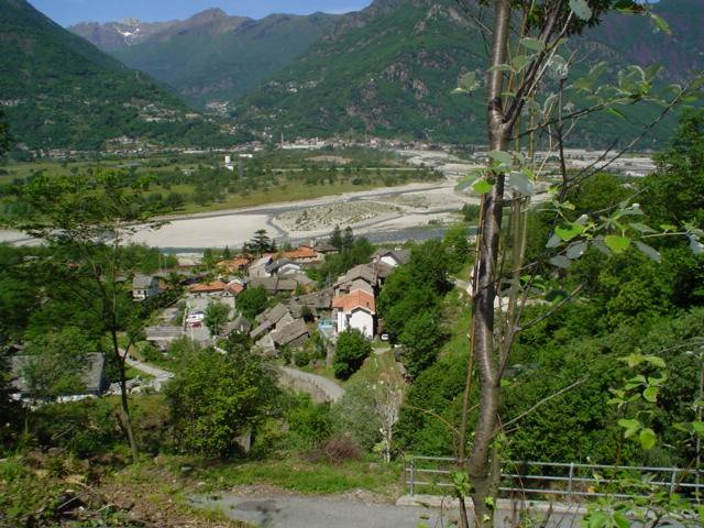 Vogogna, Piemonte, Italia